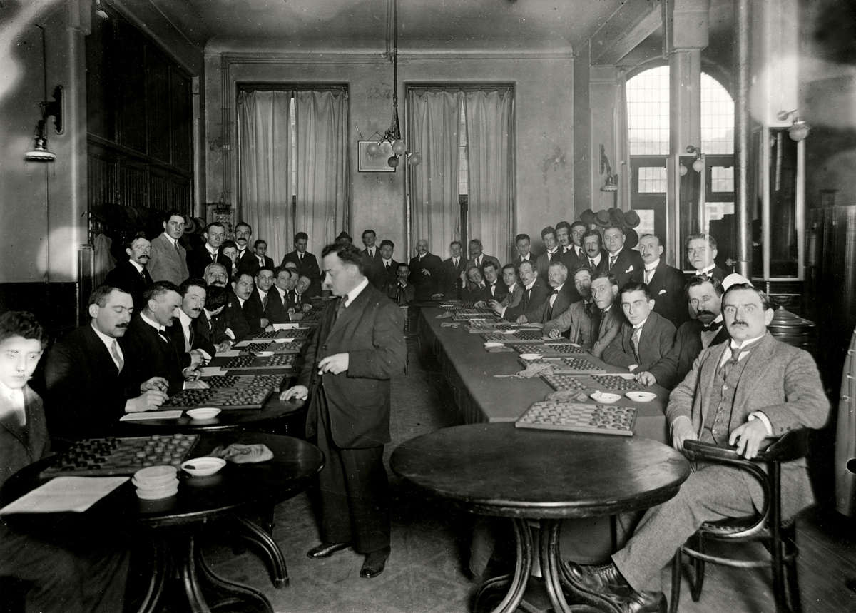 Dammen. De beroemde dam-speler Marius Fabre geeft in de Dam-vereniging "Van Embden" een simultaan-seance tegen 24 spelers. Van deze 24 partijen won Fabre er 17, speelde hij vijf remise, terwijl hij er slechts twee verloor. Amsterdam 1920. Fabre temidden van zijn uitdagers.